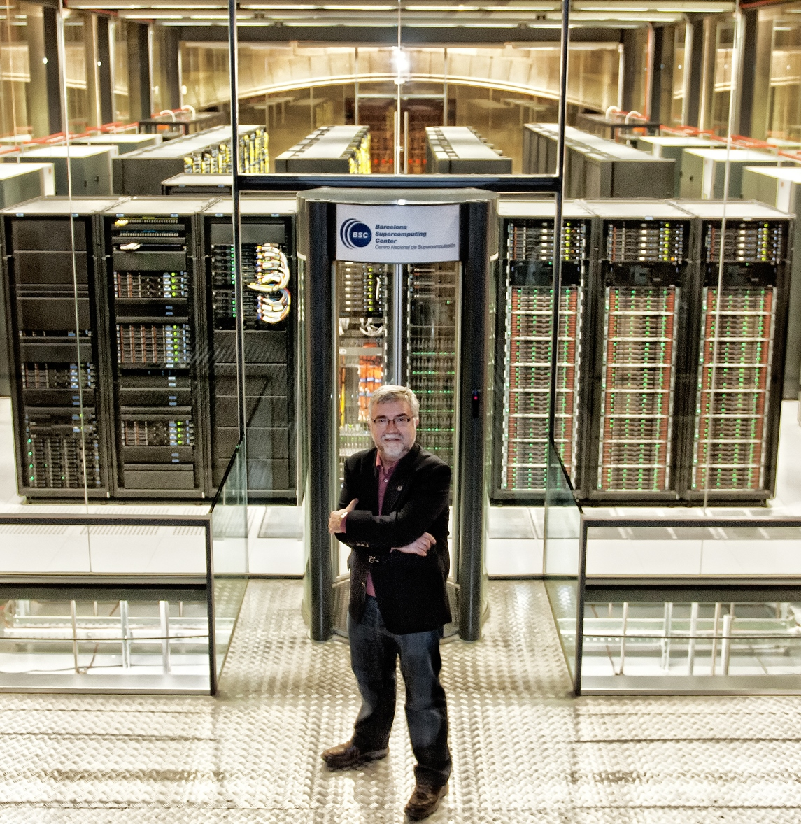 Mateo Valero junto al superordenador MareNostrum del Barcelona Supercomputing Center en 2013